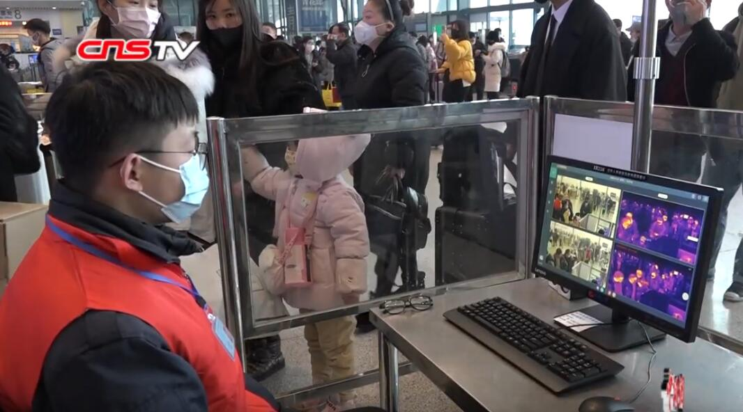 武汉火车站内，工作人员监控体温监测设备的屏幕